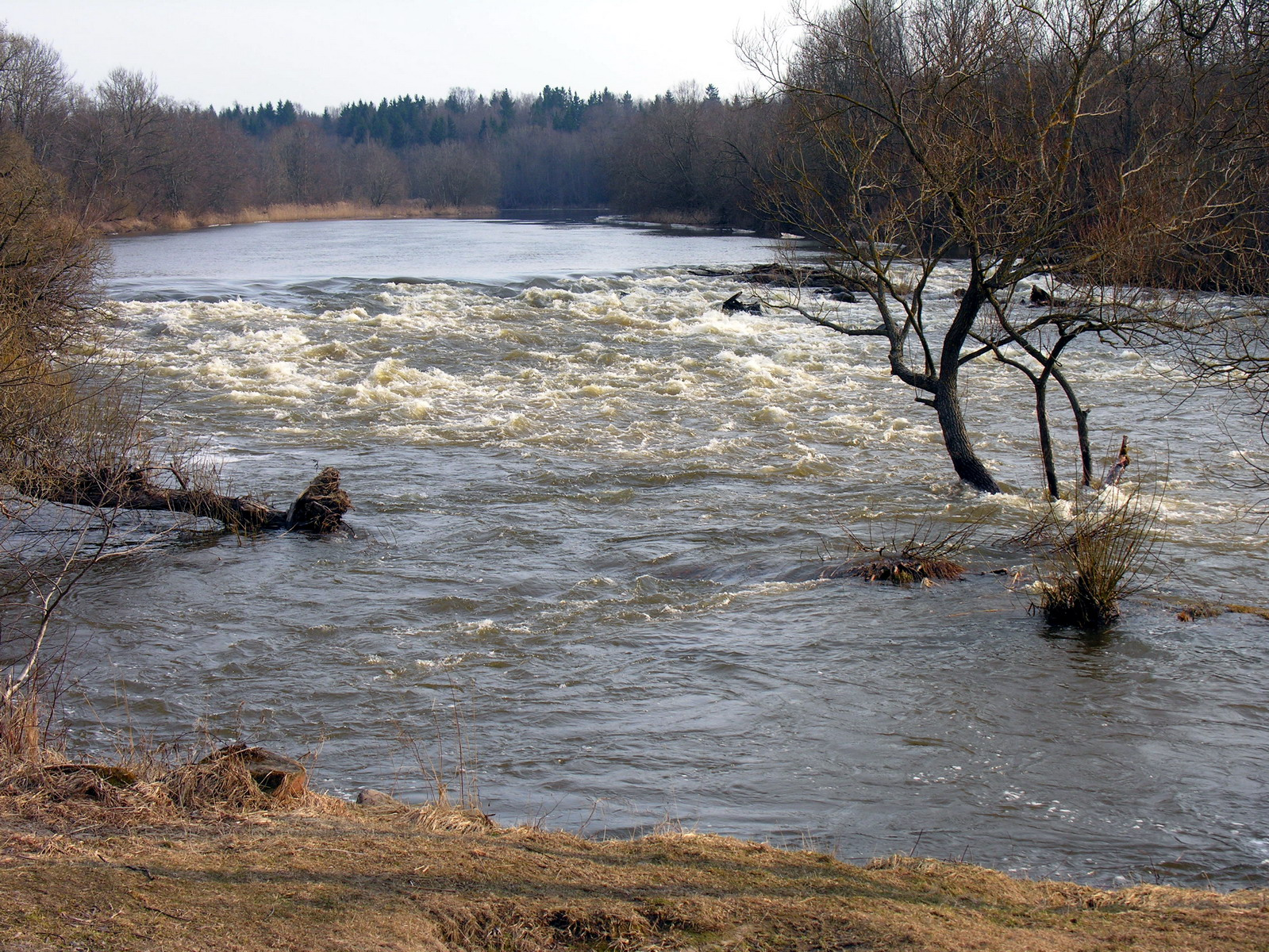 Žemaitėška: Vėnta, 2006 m. balondė 08 d.